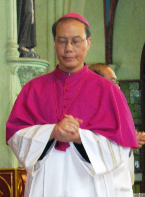 Giám mục Ngô Quang Kiệt, nguyên Tổng giám mục giáo phận Hà Nội